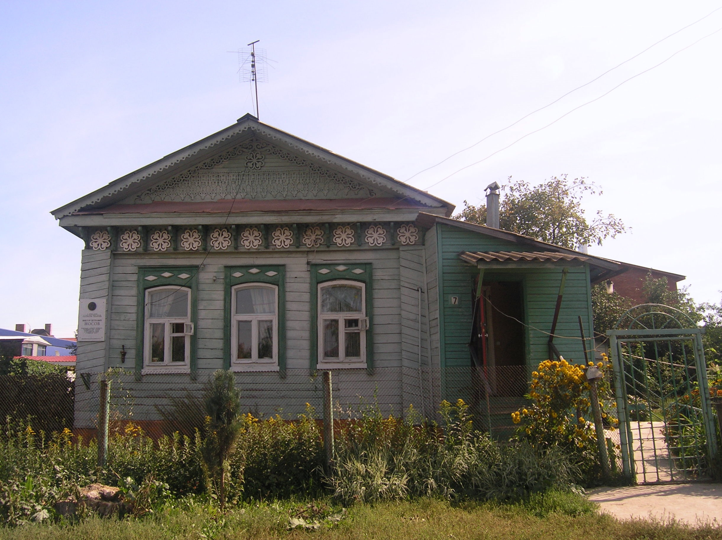 Дом, где жил Герой Российской Федерации Виктор Носов, Тольятти, Россия